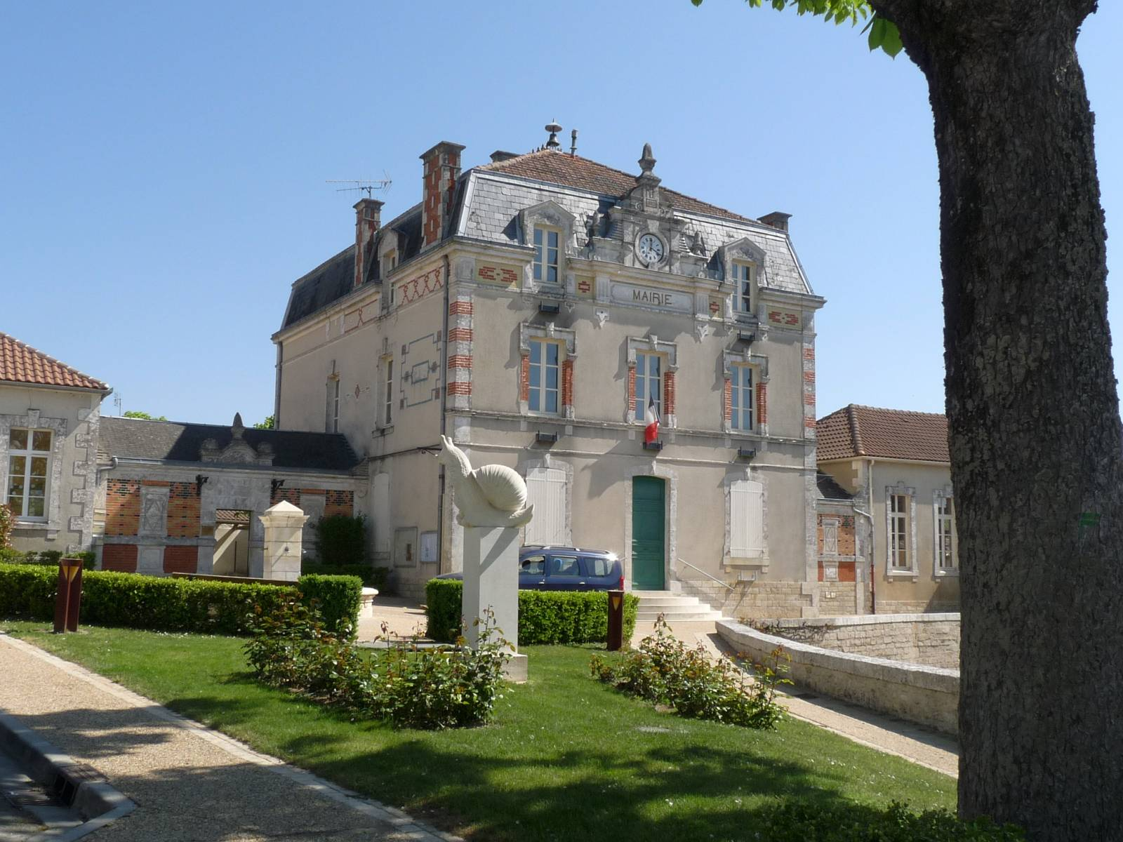 Mairie de Villejésus, Charente, France